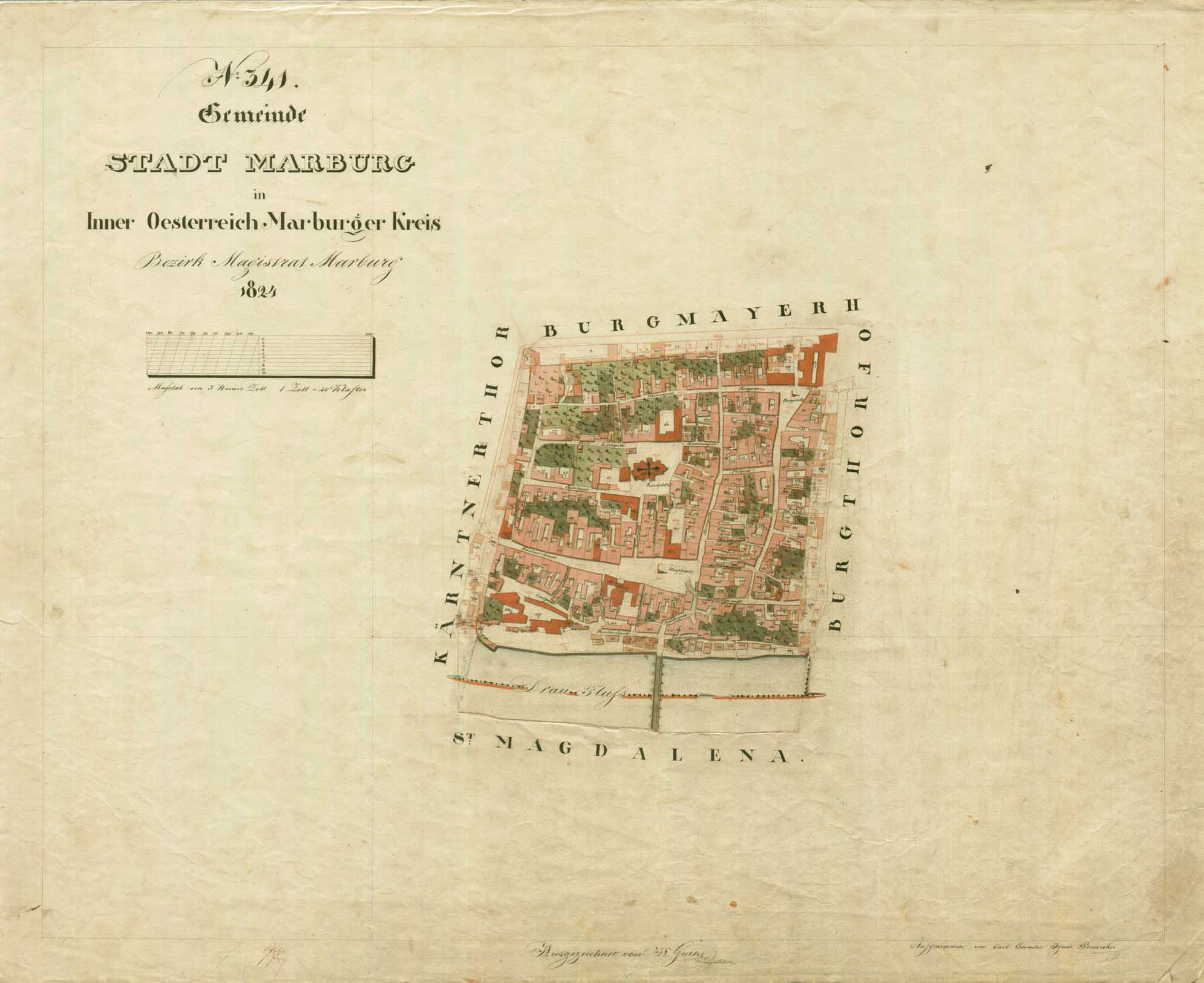 Historische Vermessungskarte: franziszeischer Kataster, Stadt Marburg im Jahr 1824. Untersteiermark, heute Slowenien.